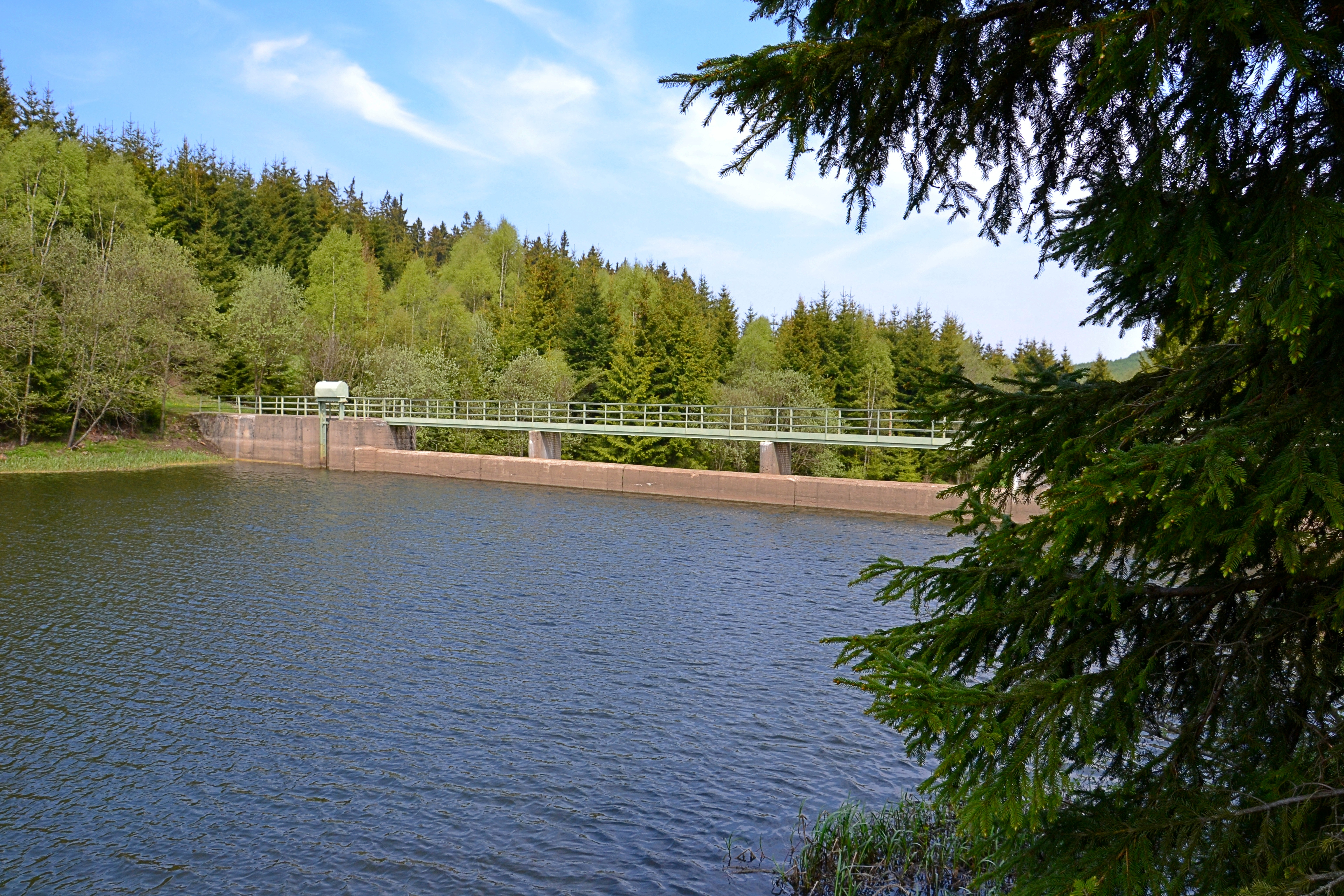 Jez na Černé vodě